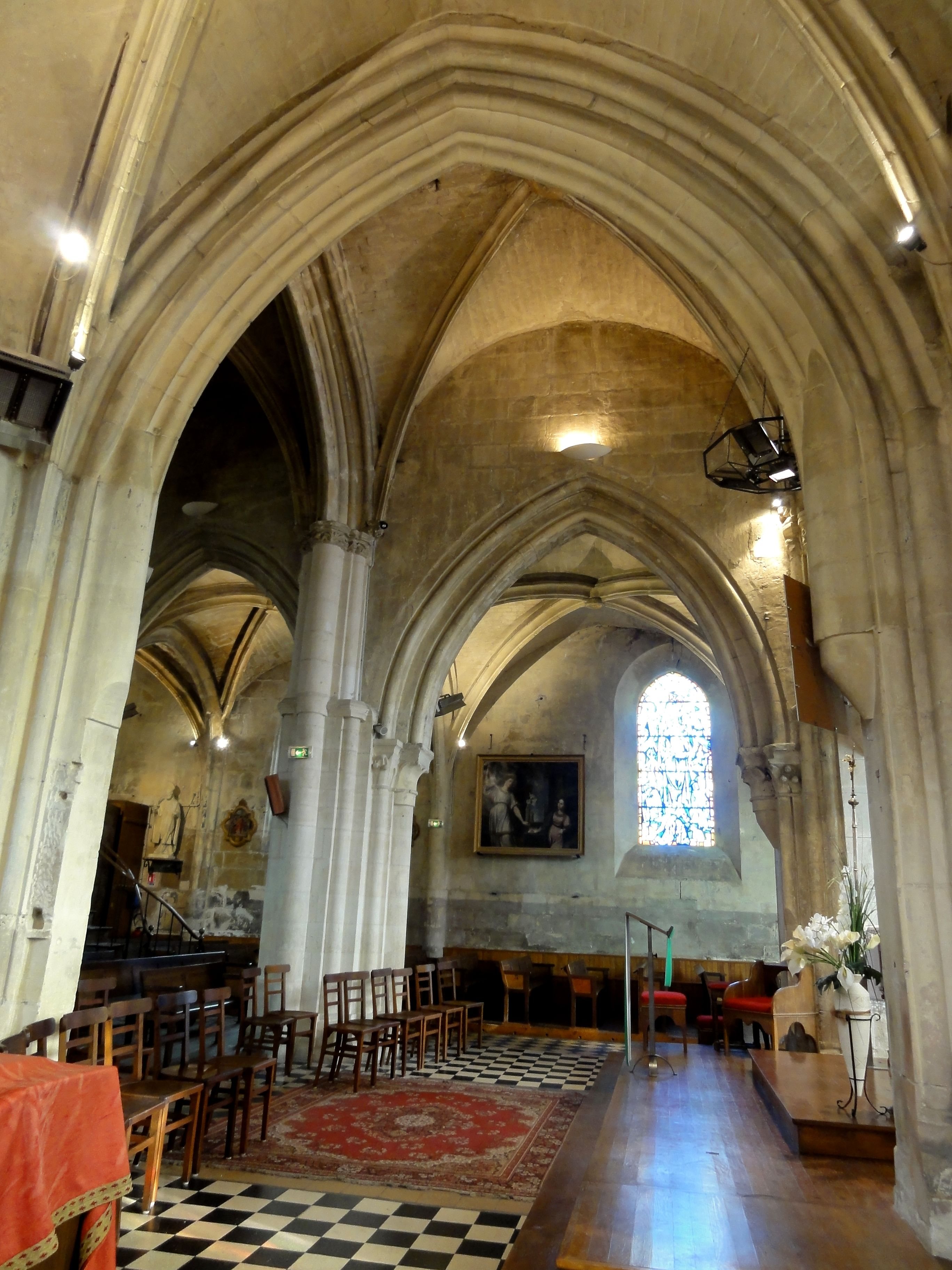 Bas-côté sud, 6e travée, vue vers le nord.